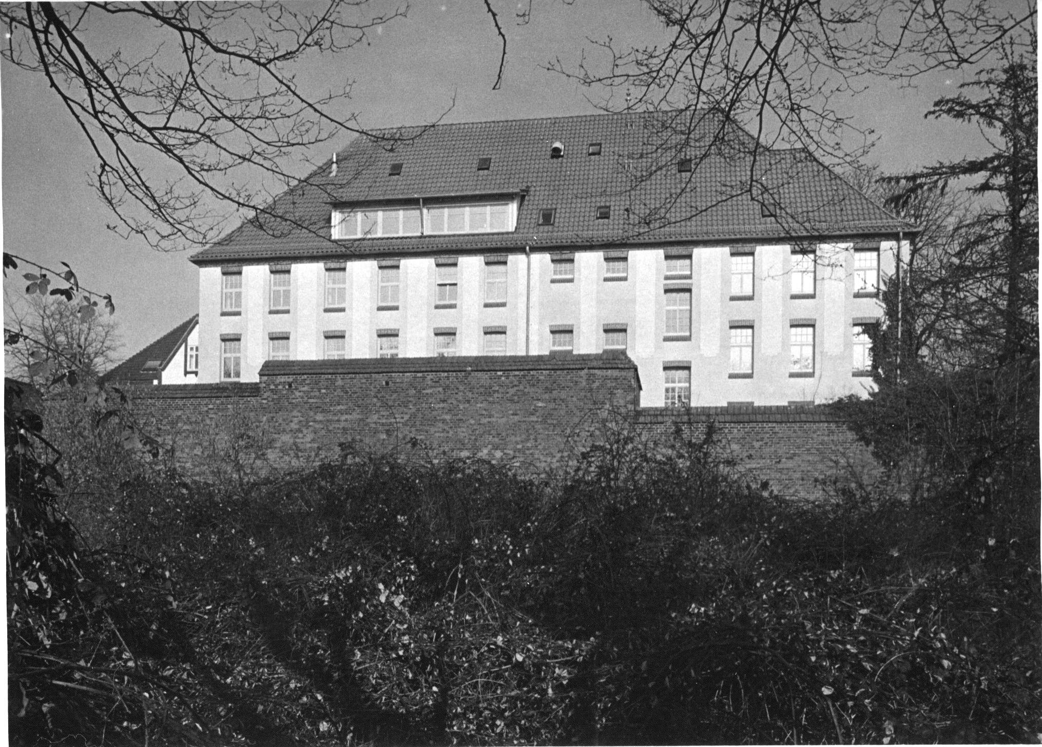 Ansicht des ehemaligen Gefängnisses hinterm Amtsgericht Blumenthal